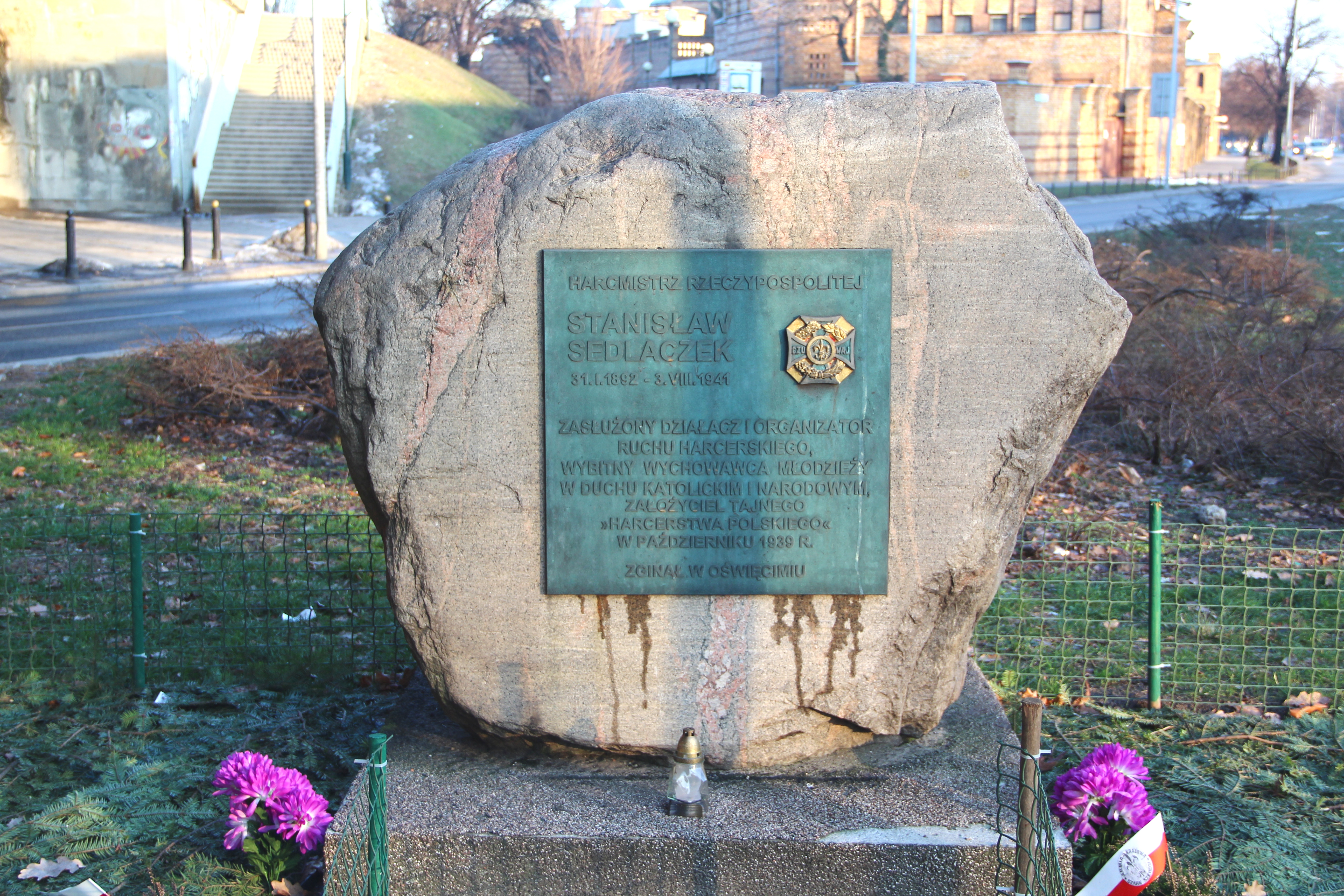 Stanisław Sedlaczek